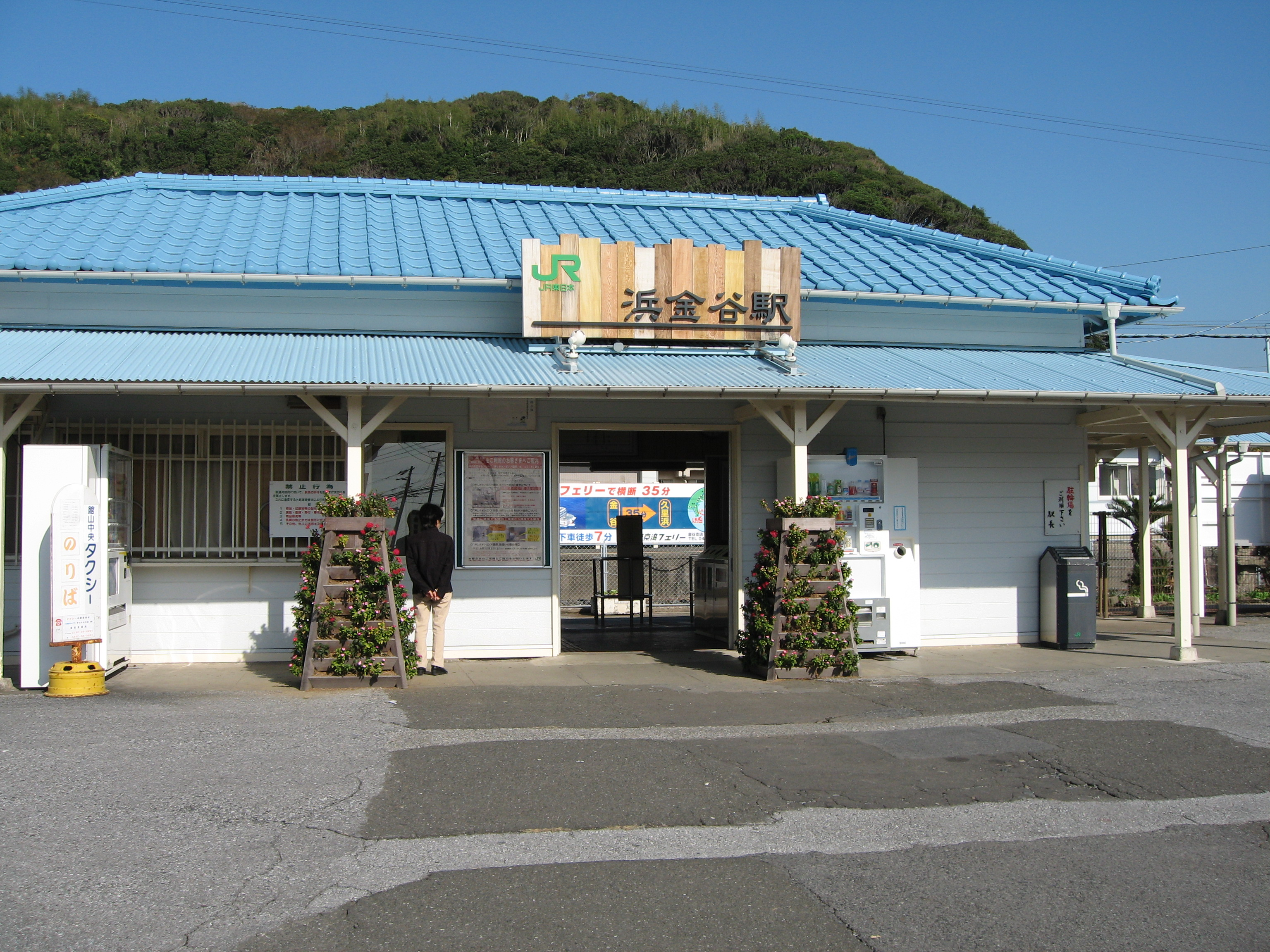 Hamakanaya station, Uchibo Line, Chiba, Japan, 浜金谷駅